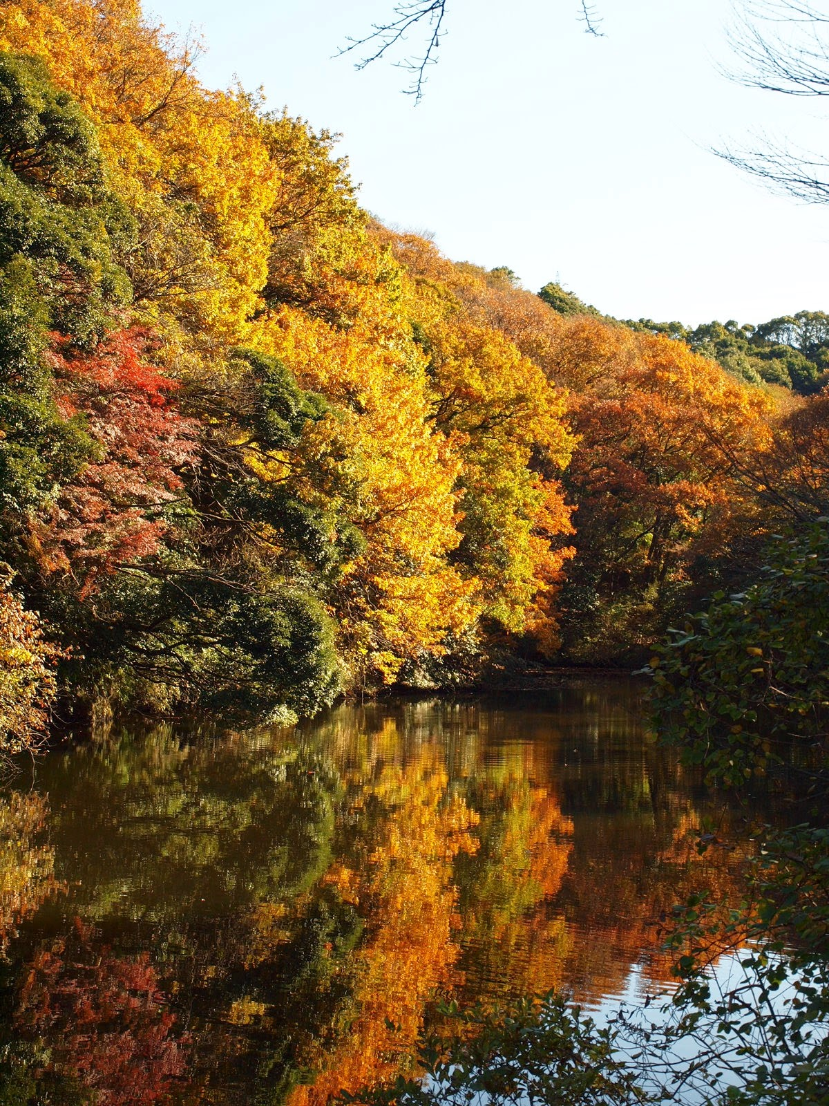 散在ガ池森林公園（鎌倉市）・2011年秋